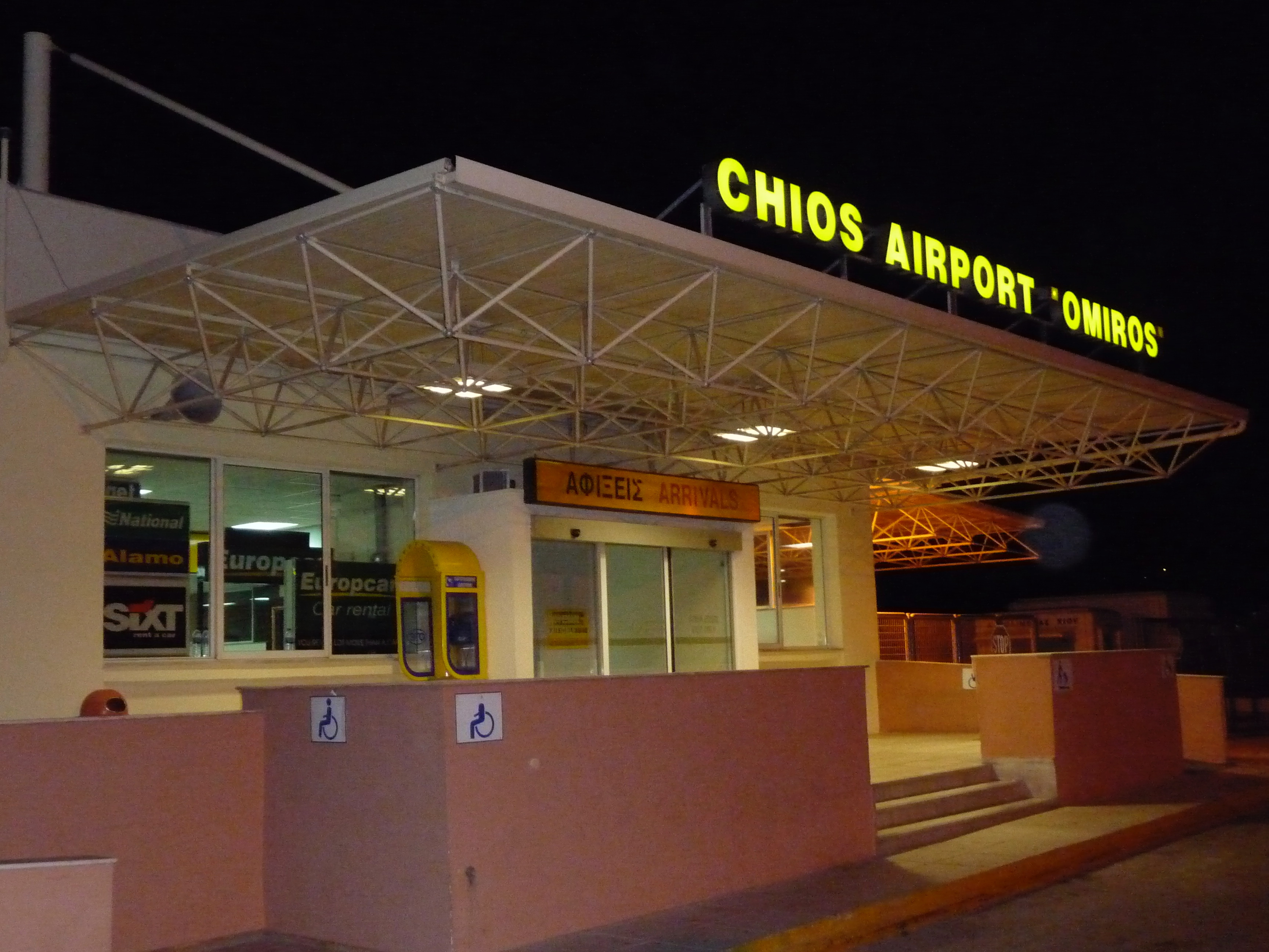 Haupteingang des Flughafen Ominös in Chios